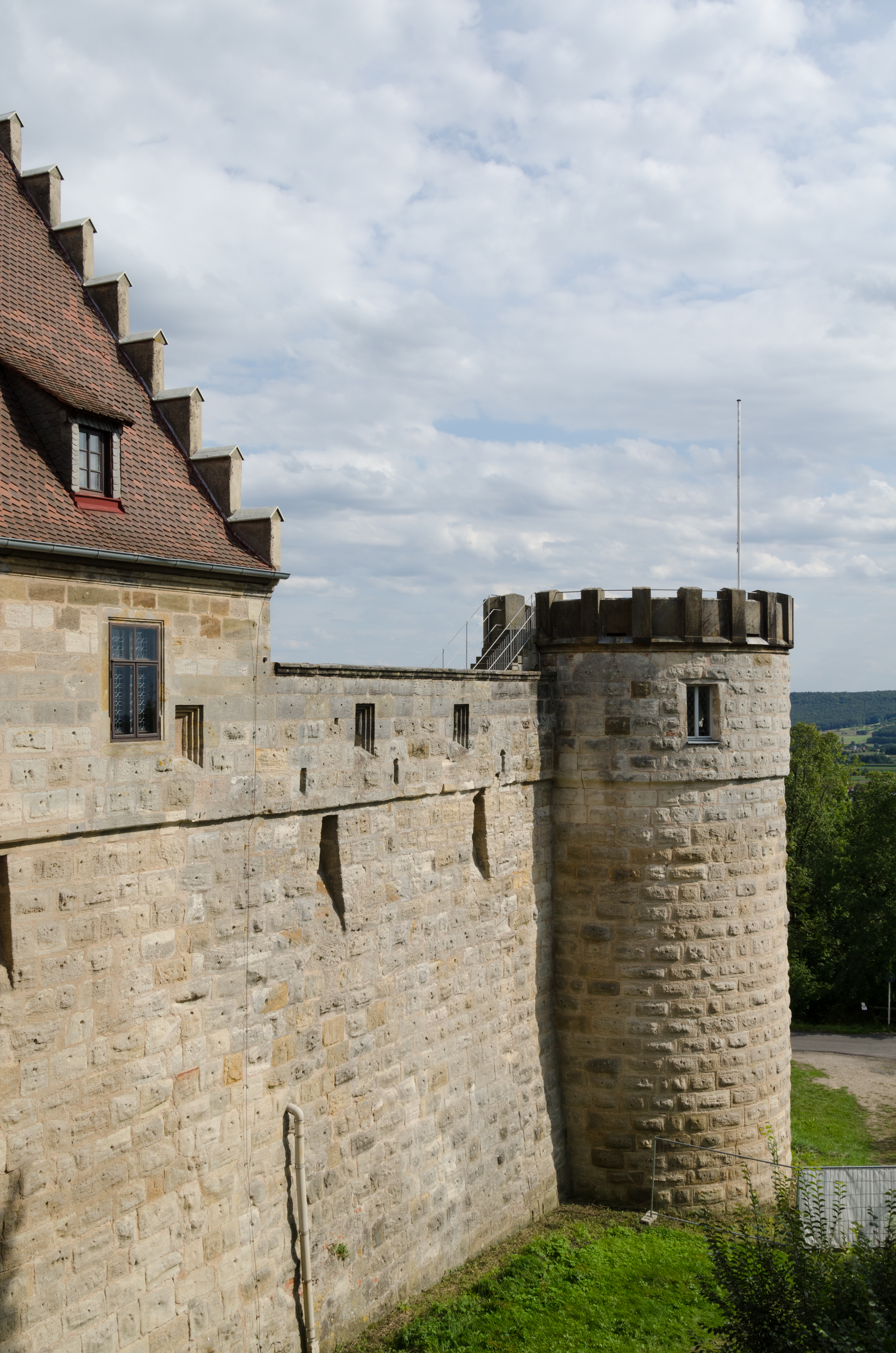 Bamberg, Altenburg